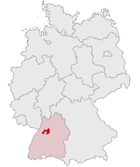 Enzkreis, Baden-Württemberg, Germany